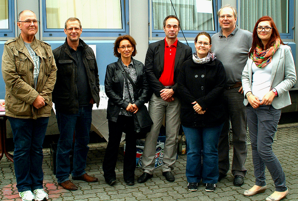 Gruppenbild während der Feierlichkeiten zum 75-jährigen Jubiläum des Hauses kirchlicher Dienste der Evangelisch-lutherischen Landeskirche Hannovers; Ralf Tyra, der Direktor des Hauses (2. von rechts) im Kreise einiger MitarbeiterInnen ...